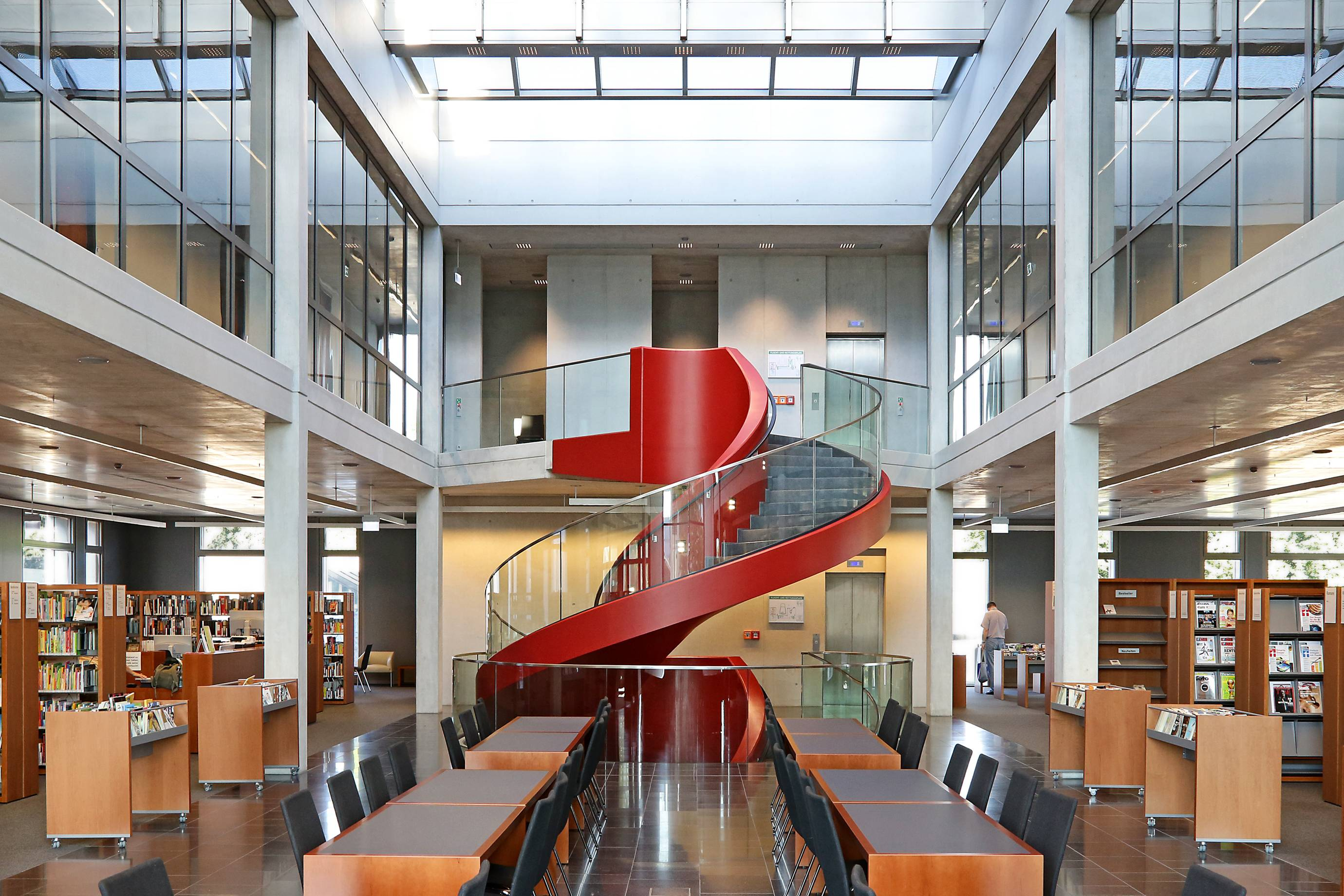 Innenansicht des Atriums der Stadtbücherei im K